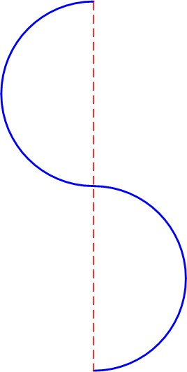 Courbe de 2 demis cercles inversés disposés en continue, avec une ligne joignant les 2 extrémités; exemple pour calculer la Sinuosité